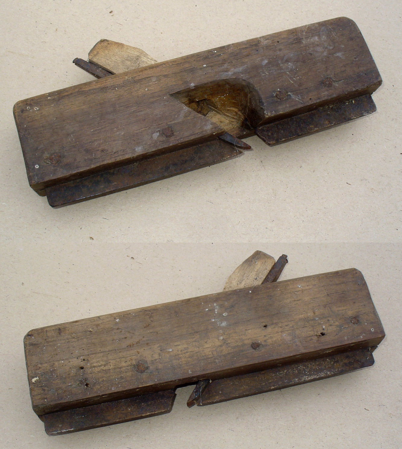 Шпунтубель. Инструмент для выборки шпунта